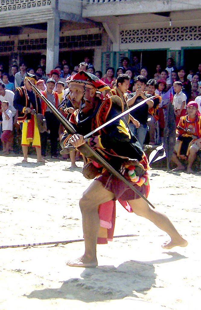 Tari Perang, Nias, Indonesia